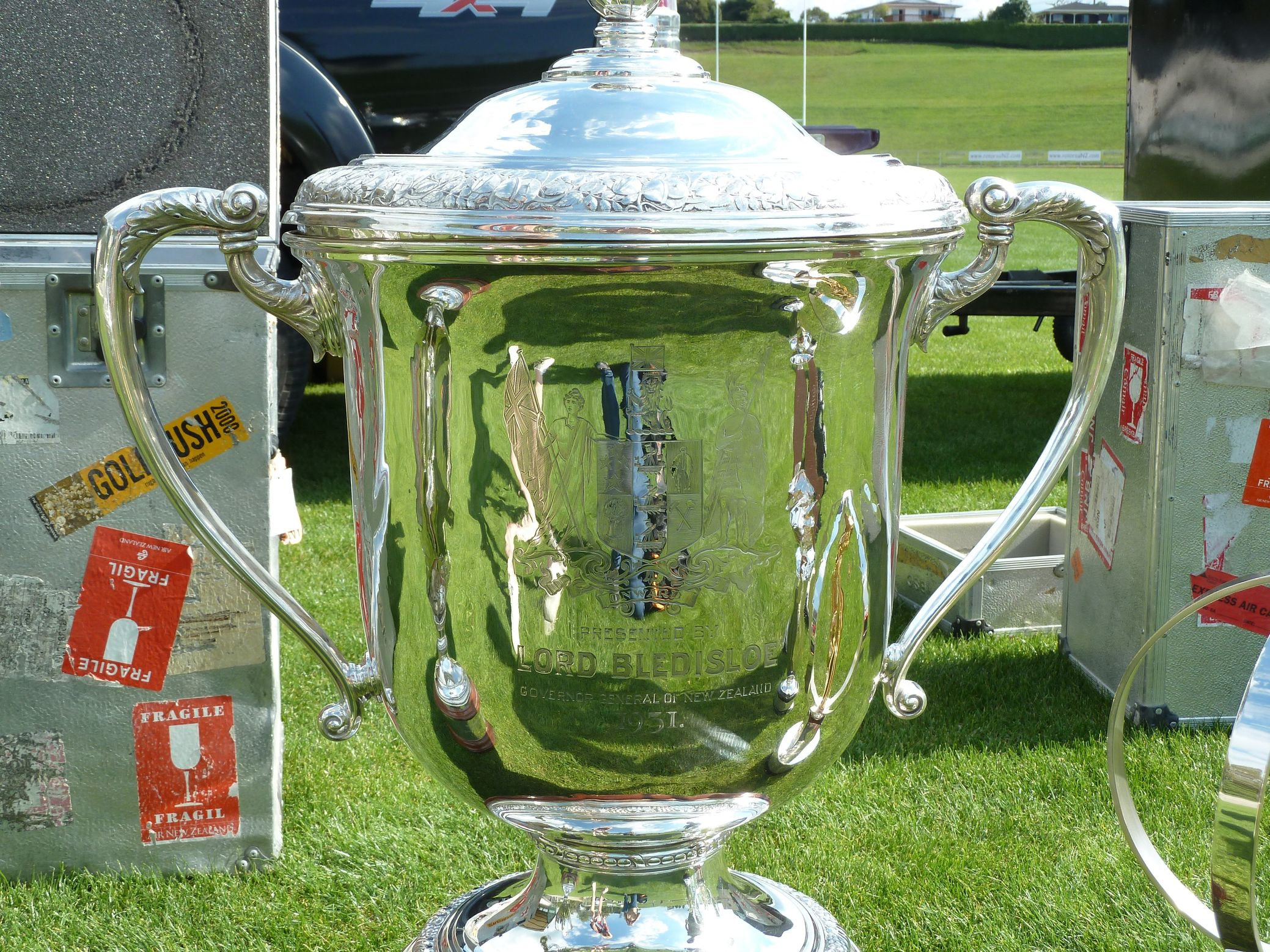 photo prise en mars 2011 à Rotorua (Nouvelle-Zélande)